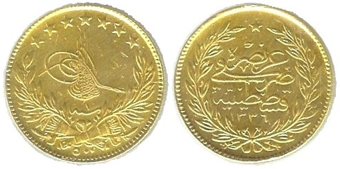 Meskuk 500 Kuruş coin minted in Kostantiniye (Constantinople), 1336/1.